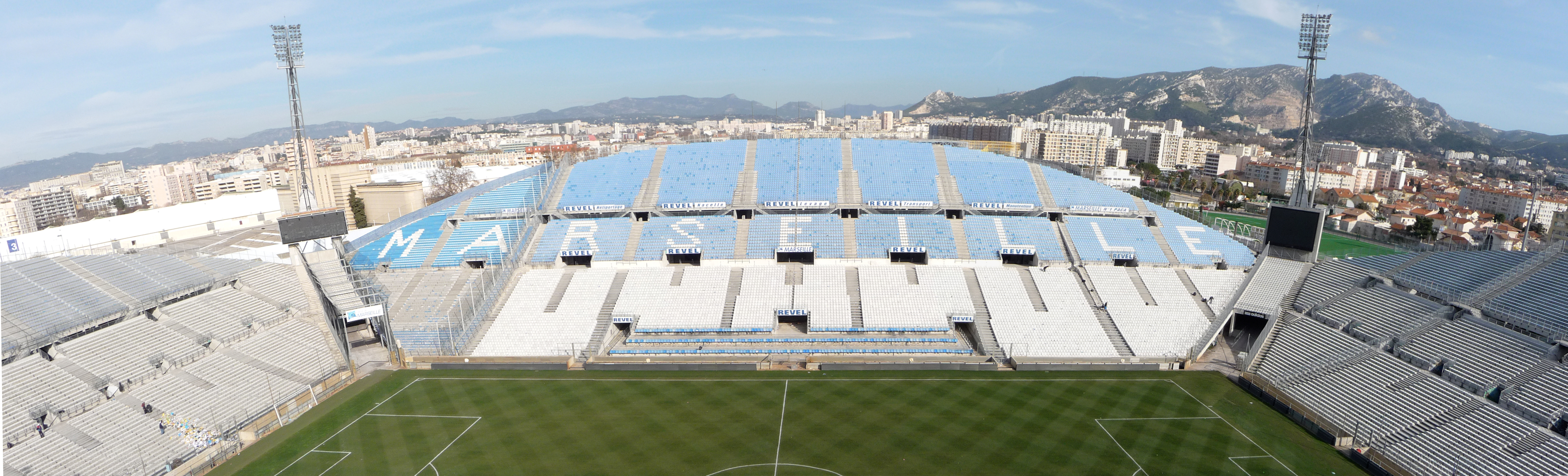 La tribune nord du stade Vélodrome de Marseille, en France